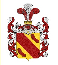 Este es el escudo de armas de la famila Magrina de origen italiano